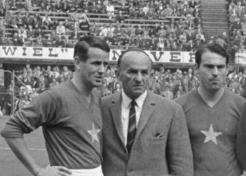 Teamfoto van MVV: staand; Krisp, trainer Donnenfeld, Toenaer.